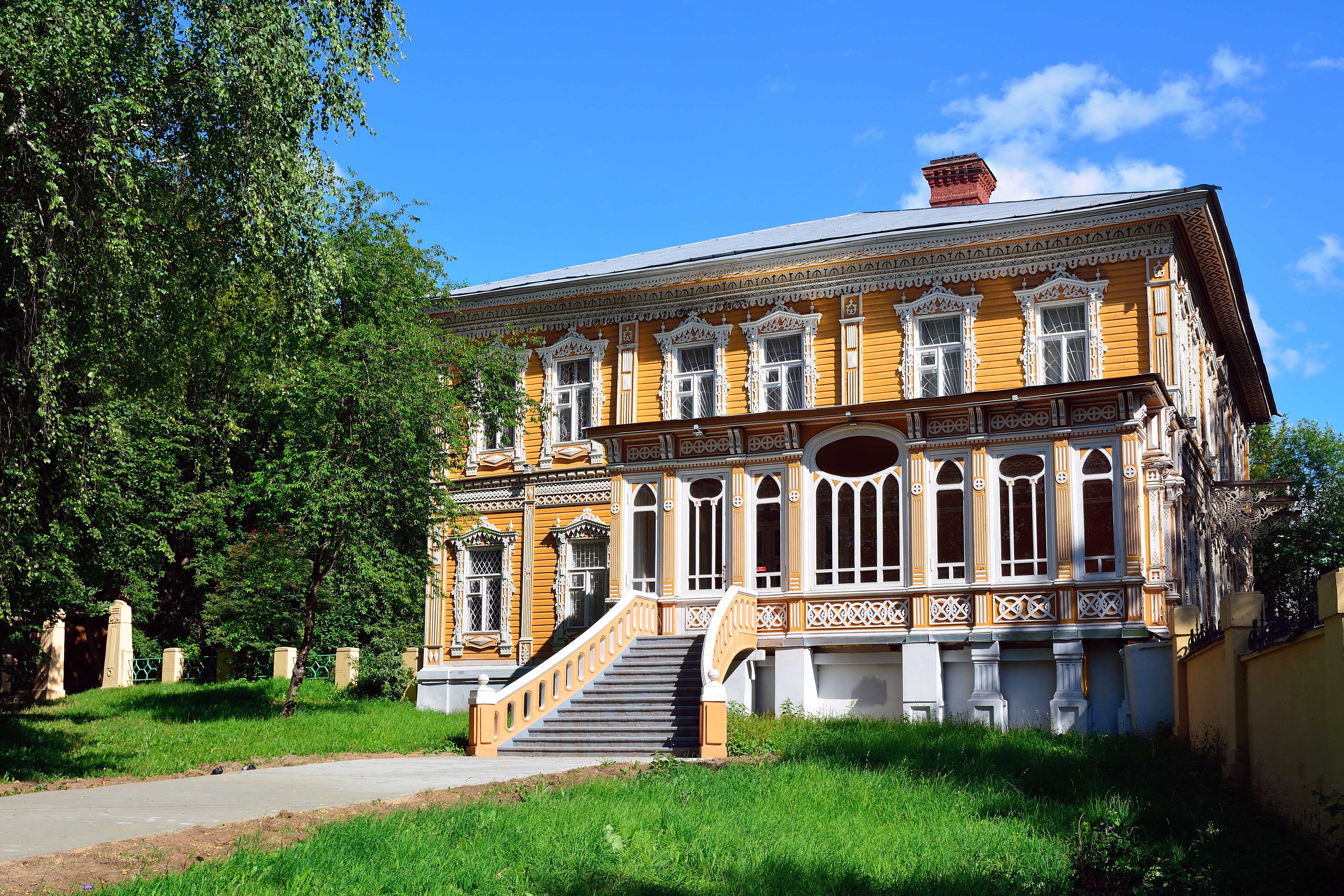 усадьба Лосева: улица Советская, 9, 10, Фурманов, Фурмановский район, Ивановская область